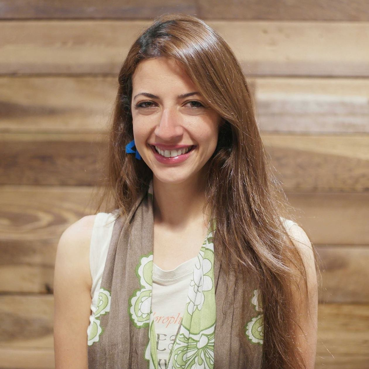 صورة إيمان حيلوز مؤسسة موقع أبجد